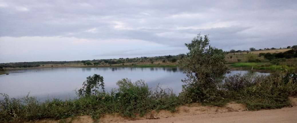 Açude do Mamédio, importante corpo d'água na região de Bela Vista, Araci.